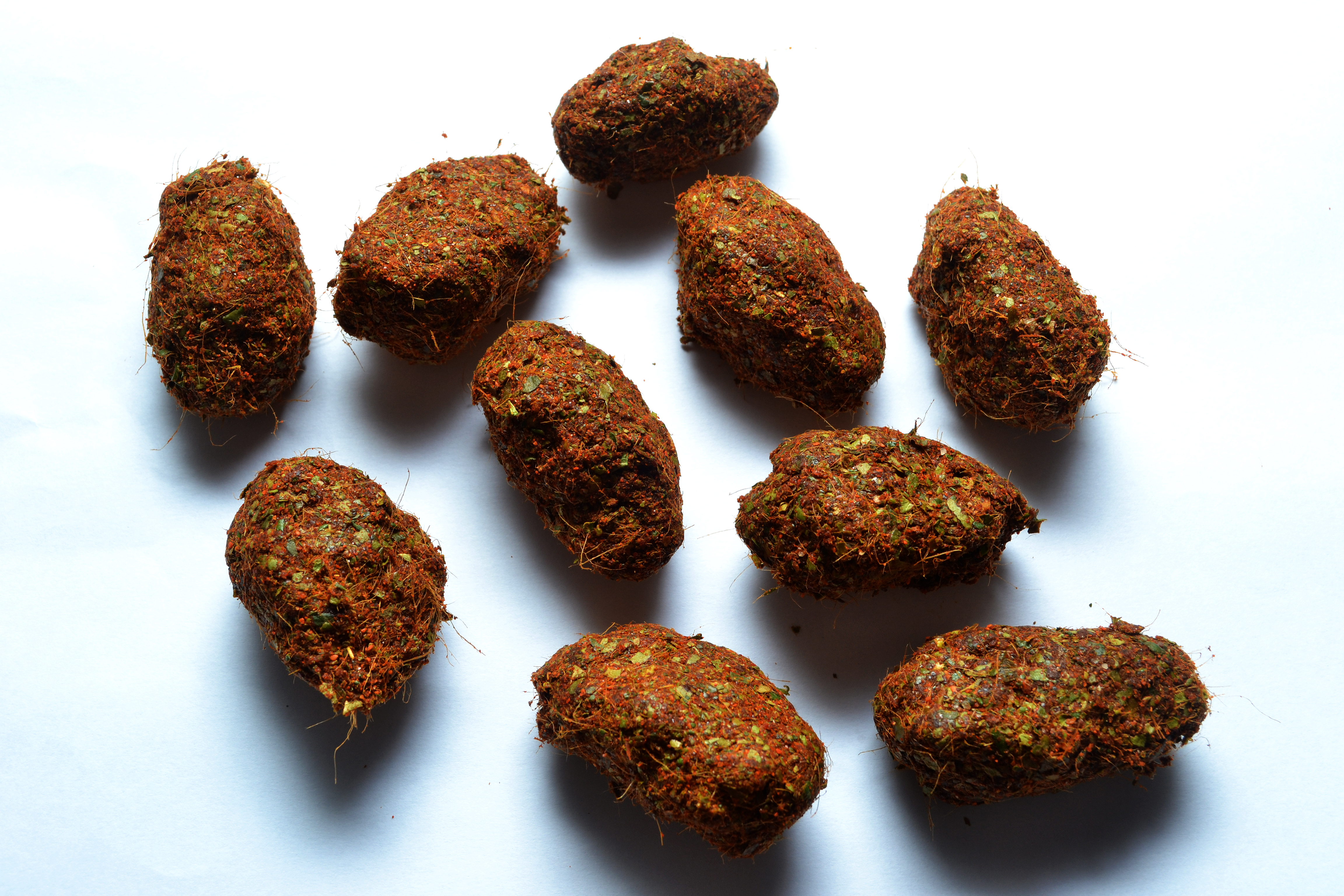 വേപ്പിലക്കട്ടി മധ്യ തിരുവിതാംകൂറിലും പാലക്കാടന്‍ ആഗ്രഹാരങ്ങളിലും പ്രചാരത്തില്‍ ഉണ്ടായിരുന്നതും ഇപ്പോള്‍ കേരളത്തില്‍ എമ്പാടും പ്രചാരത്തില്‍ ഉള്ളതുമായ ഒരു ചമ്മന്തി ഇനമാണ് വേപ്പിലക്കട്ടി. പാലക്കാടന്‍ അഗ്രഹാരത്തിന്റെ തനതുരുചികളിലൊന്നാണ് ഇത്. തൈരും വേപ്പിലക്കട്ടിയും കൂട്ടിയുള്ള ഊണ് അഗ്രഹാരങ്ങളില്‍ സാധാരണയാണ്. വേപ്പിലക്കട്ടി എന്നാണ് പേരെങ്കിലും ഇതിന്റെ നിര്‍മ്മാണത്തിന് വേപ്പില നിര്‍ബന്ധമില്ല. കേരളത്തില്‍ പലയിടത്തും പ്രാദേശികമായി ഇതുണ്ടാക്കുന്നതിനുള്ള അസംസ്കൃത വസ്തുക്കള്‍ വിത്യാസപ്പെട്ടിരിക്കുന്നുണ്ട്. നിര്‍മ്മാണ രീതി : വലിയ നാരകത്തിലയോ ചെറുനാരകത്തിലയോ നാരുകളഞ്ഞ് എടുക്കുക. ആവശ്യത്തിനു കറിവേപ്പില വറ്റൽമുളക് എന്നിവയും കരുതുക. അല്പം അയമോദകവും പാകത്തിനു കല്ലുപ്പുംകൂട്ടി ഉരലിൽ ഇട്ട് ഇടിച്ചു പൊടിയാക്കിയതിനു ശേഷം വറ്റൽമുളക് ചേർത്ത് വീണ്ടും ഇടിച്ചു പൊടിക്കുക. യോജിച്ചു കഴിഞ്ഞാൽ നാരകത്തിലയും കറിവേപ്പിലയും ഇട്ട് ഇടിക്കുക. ഇടിയുടെ ഊക്കുകൊണ്ട് ഇലകൾ പൊടിയണം. പിന്നെ ഉപ്പു ചേർത്ത് നല്ലവണ്ണം പൊടിയാകുന്നതു വരെ ഇടിക്കുക. പിന്നീട് അത് പായിലിട്ട് അല്പം ഉണക്കി മൺകലത്തിൽ അടച്ചു സൂക്ഷിച്ചാൽ എത്രകാലം വേണമെങ്കിലും ഇരിക്കും. മോരോ തൈരോ കൂട്ടി ഉണ്ണുമ്പോൾ വേപ്പിലക്കട്ടി ഉപയോഗിക്കാം.